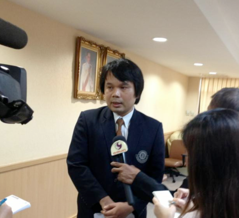 รศ. ดร. วีรชัย พุทธวงศ์